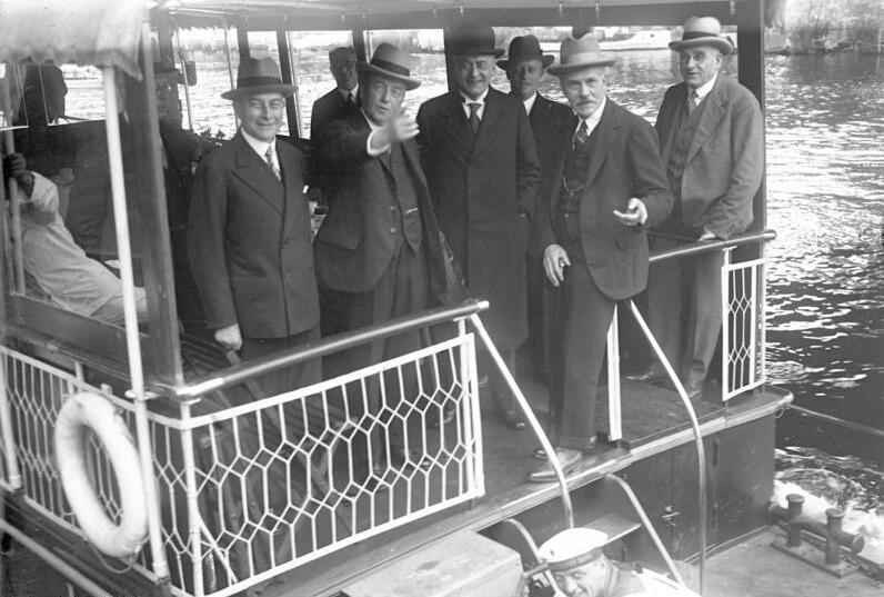 Dampferausflug der Reichsregierung mit den in Berlin weilenden englischen Gästen auf dem Wannsee b/Berlin! Die Reichsregierung mit den englischen Gästen während ihres Ausfluges auf dem Wannsee. Von links nach rechts: Reichsaussenminister Dr. Curtius, der englische Aussenminister Henderson, Reichskanzler Dr. Brüning, der englische Premierminister MacDonald, der preussische Ministerpräsident Dr. Braun.